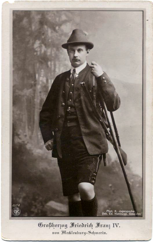 Großherzog Friedrich Franz IV als Jäger vor einer gemalten Waldkulisse im Fotostudio des Carl Jagerspacher in Gmunden/Österreich